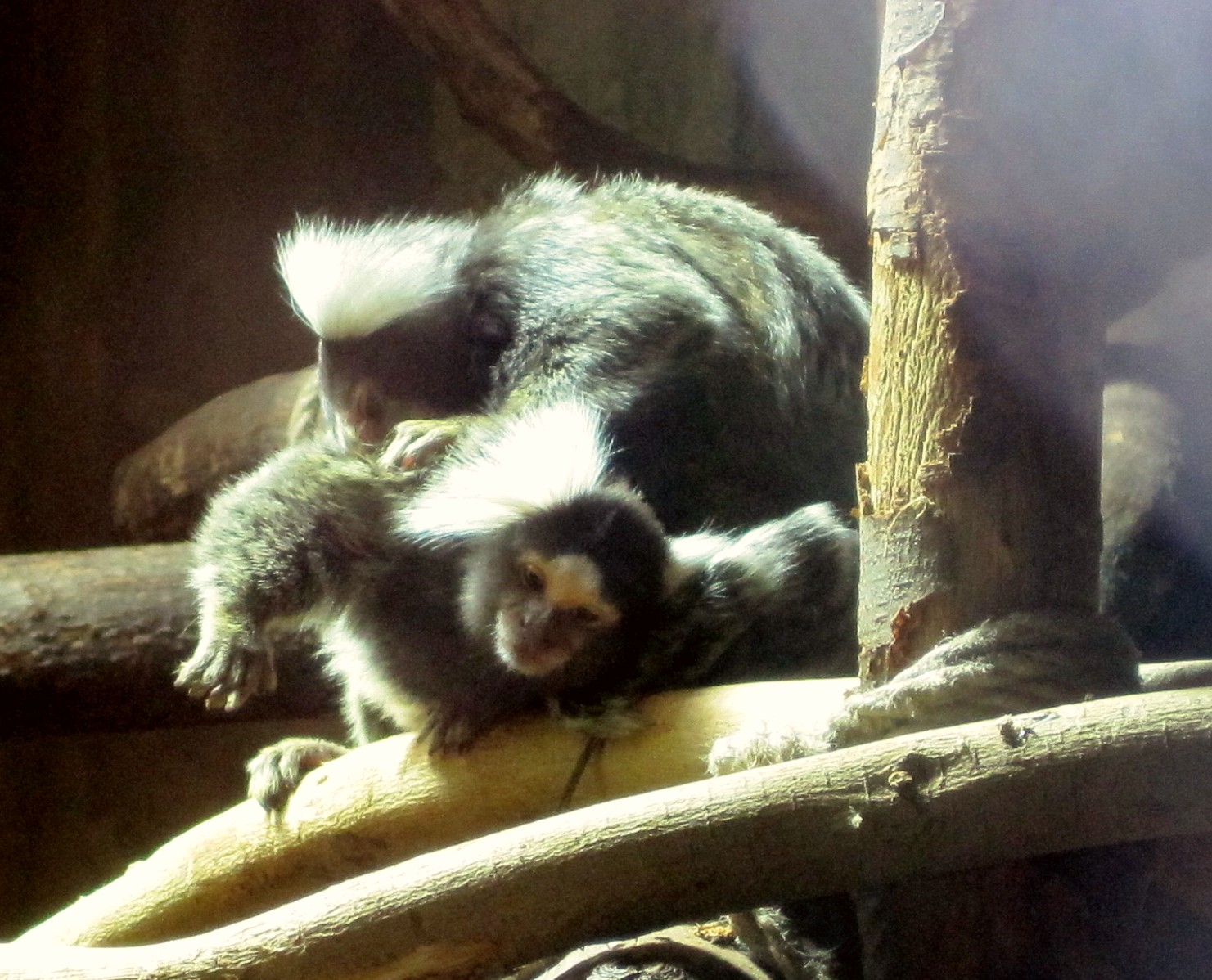 Weißbüschelaffen ( Callithrix jacchus ) im Zoo Hannover. Zwei Affen bei der sozialen Fellpflege.